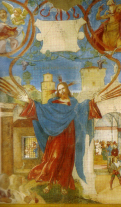 Lotto, affreschi di trescore 01.1